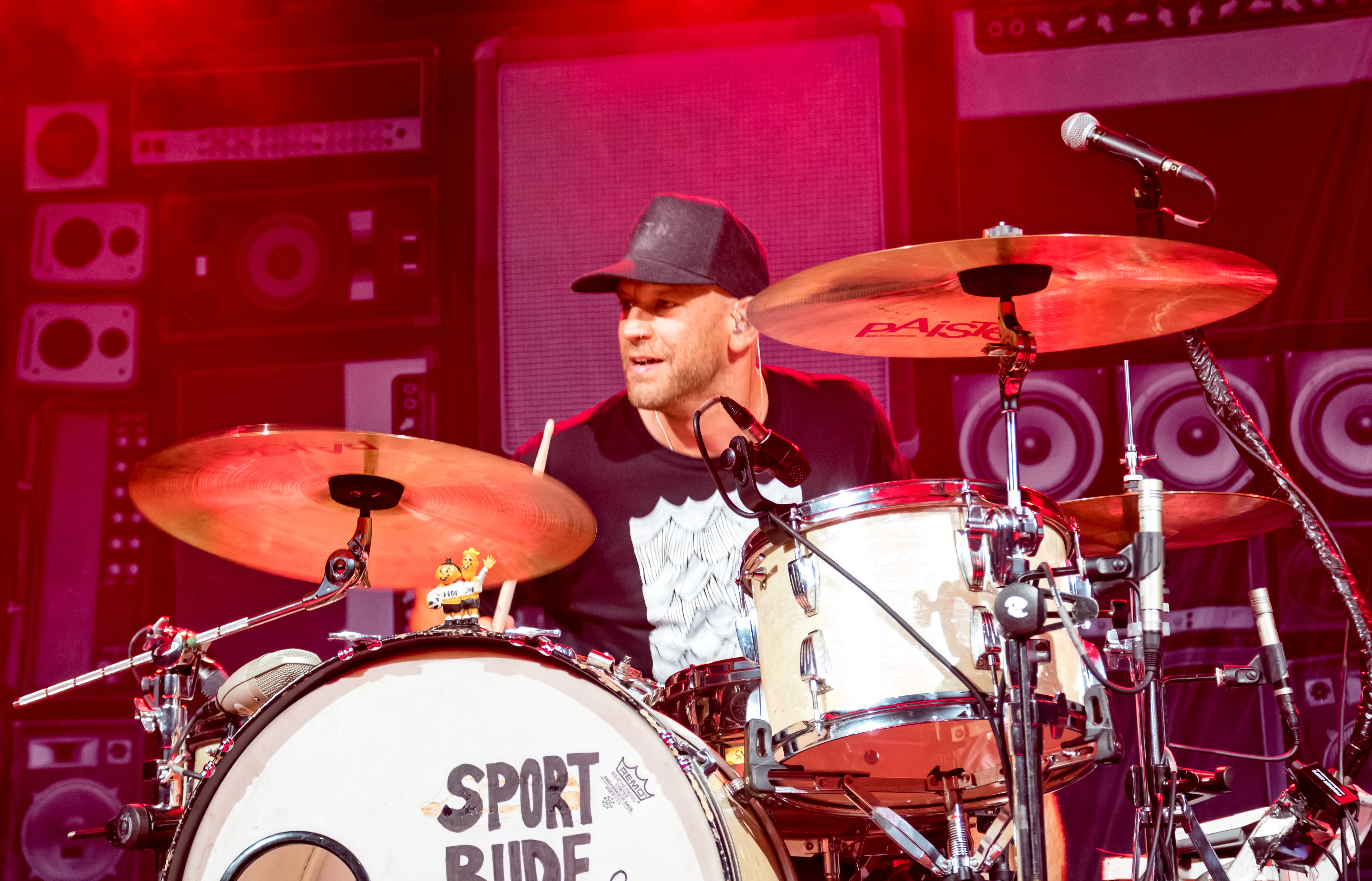 Bilder vom Zelt Musik Festival 2017 in Freiburg im Breisgau Sportfreunde Stiller am 18.07.2017